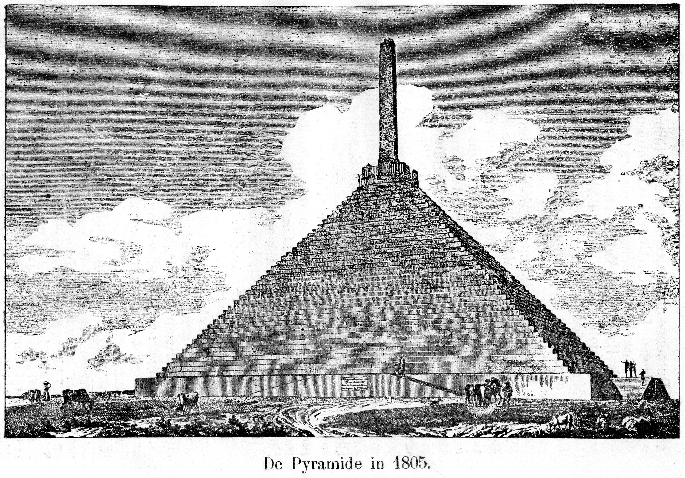 Gravure van de Piramide van Austerlitz, Nederland door Baltard in ca 1805